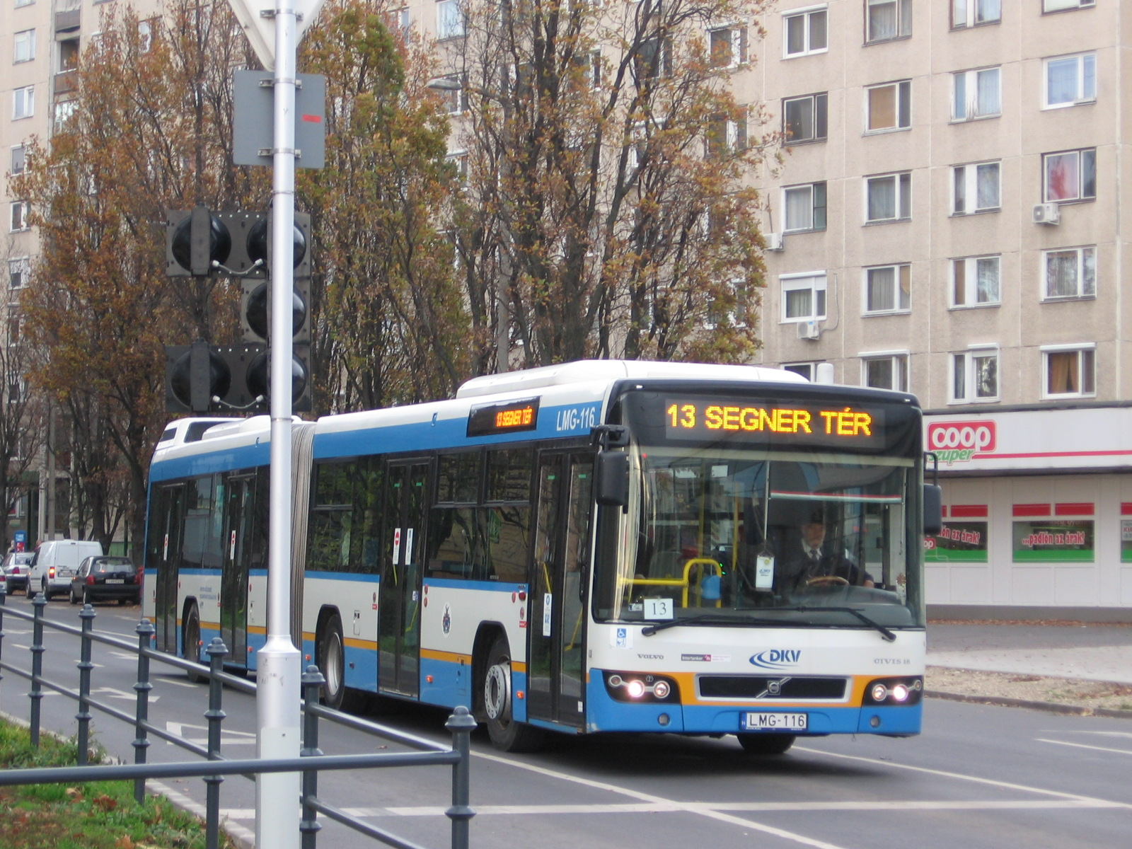 Egy Volvo B9LA-Alfa Cívis 18 típusú busz a Bethlen utcán. (13-as járat Honvéd utca és Jókai utca megállók között.)